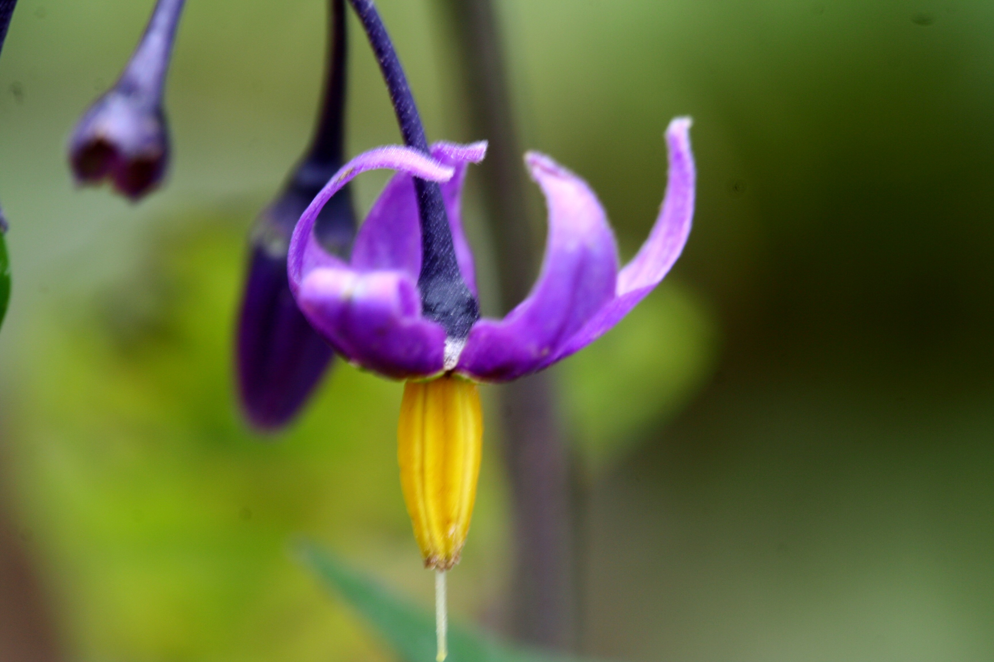 Solanum_dulcamara (Morella rampicante) Località : Giardino Botanico Alpino "Giangio Lorenzoni", Pian Cansiglio, Tambre d'Alpago (BL), 1000 m s.l.m.